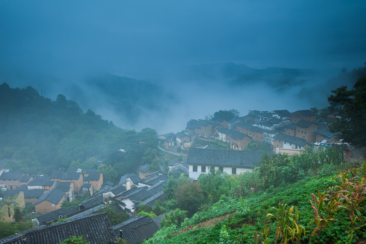 中文（中国大陆）: 阳产德味儿